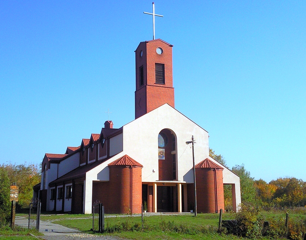 Parafia pw. Świętych Archaniołów Michała, Gabriela i Rafała w Czeladzi została ustanowiona 24 lipca 1989 r. przez biskupa częstochowskiego Stanisława Nowaka. Pierwszym proboszczem został ks. Mirosław Siółko. Terytorialnie wydzielona została z części parafii pw. Matki Bożej Bolesnej w Czeladzi-Pisakach. W 1988 r. z inicjatywy biskupa częstochowskiego rozpoczęto starania o pozyskanie placu pod budowę przyszłego ośrodka duszpasterskiego na osiedlu „Dziekana". Do czasu wzniesienia tymczasowej kaplicy kult sprawowano w niewielkiej kaplicy przy ul. Brzozowej. Budowę kościoła rozpoczęto w 1990 r. i trwa nadal. Biskup sosnowiecki Adam Śmigielski SDB 30 września 2001 r. pobłogosławił wybudowaną przy świątyni plebanię. We wnętrzu na uwagę zasługują m.in. witraże przedstawiające świętych i błogosławionych.